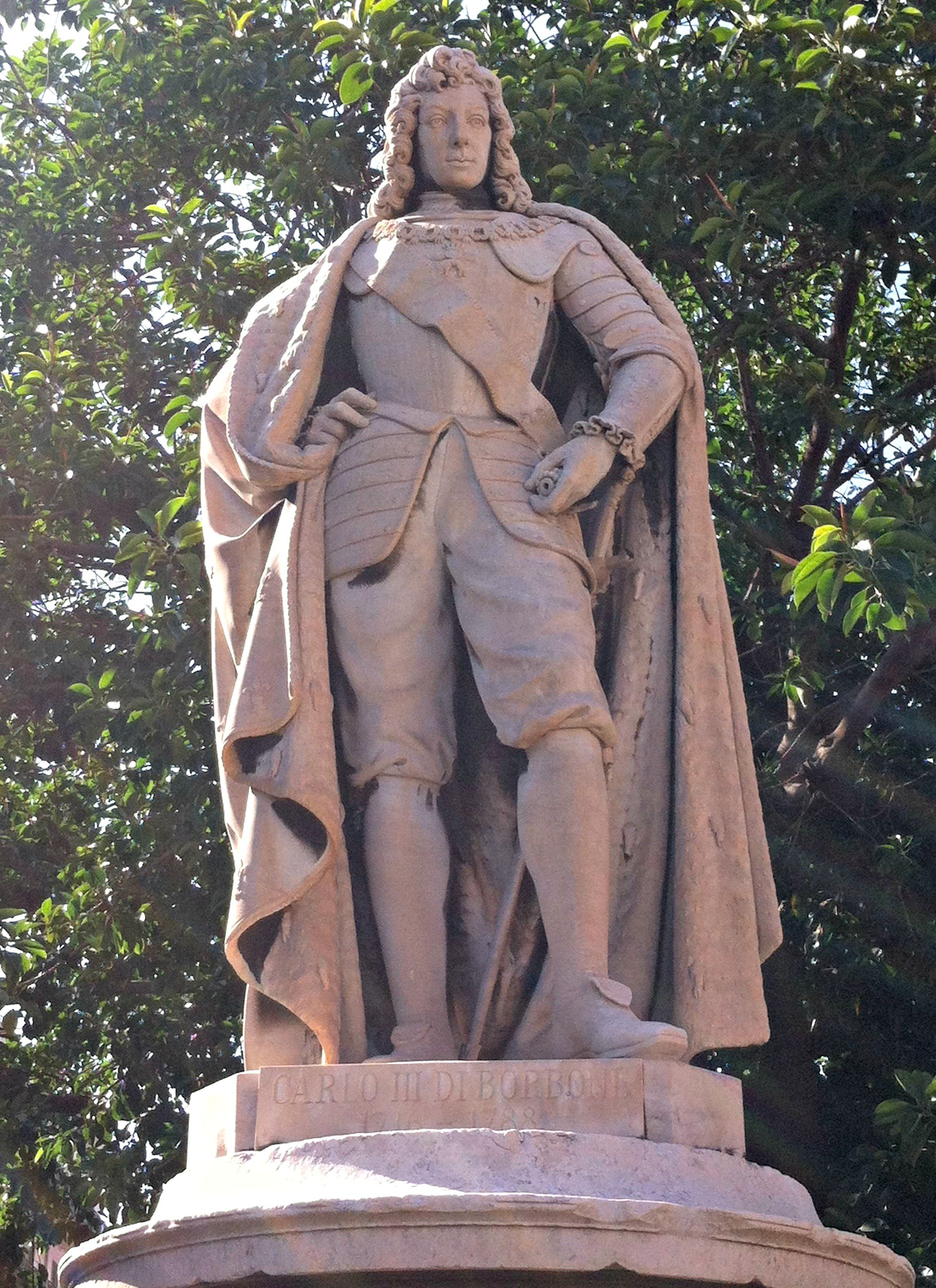 Statua del 1859 di Carlo III di Spagna a Messina